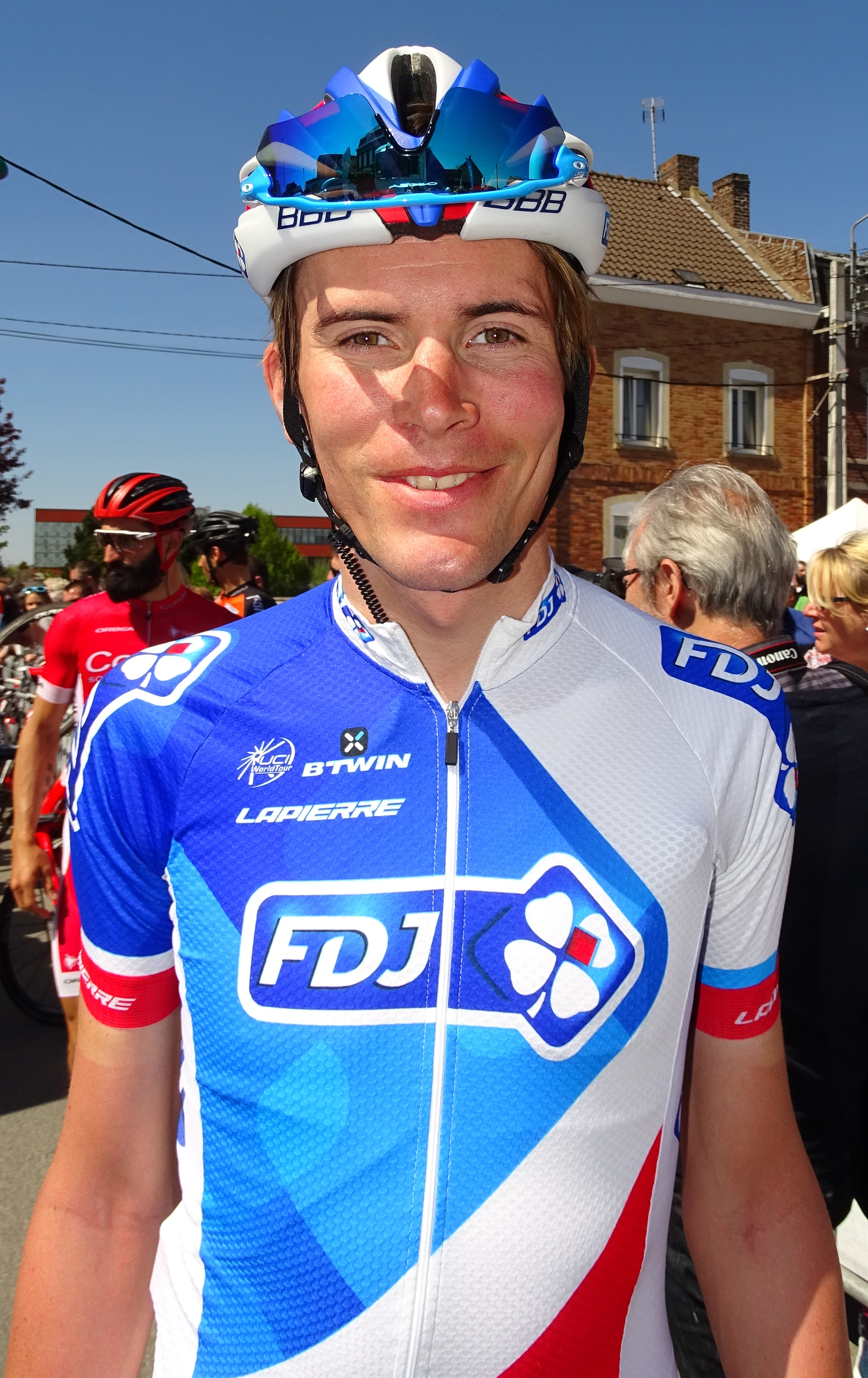 Reportage réalisé le jeudi 5 mai 2016 à l'occasion du départ et de l'arrivée de la deuxième étape des Quatre jours de Dunkerque 2016 à Aniche, Nord, Nord-Pas-de-Calais, France.